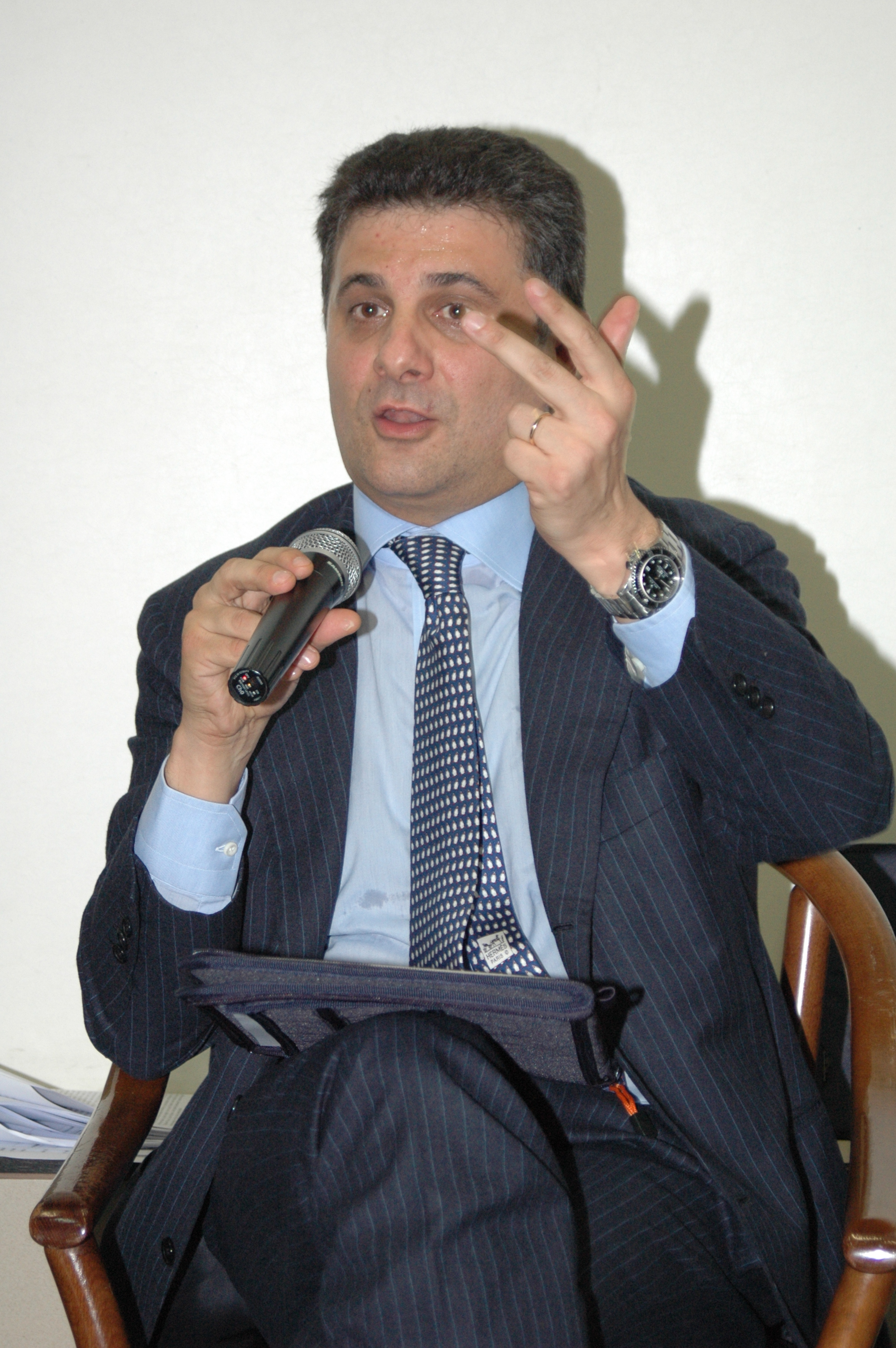 Vito De Filippo, governatore della regione Basilicata